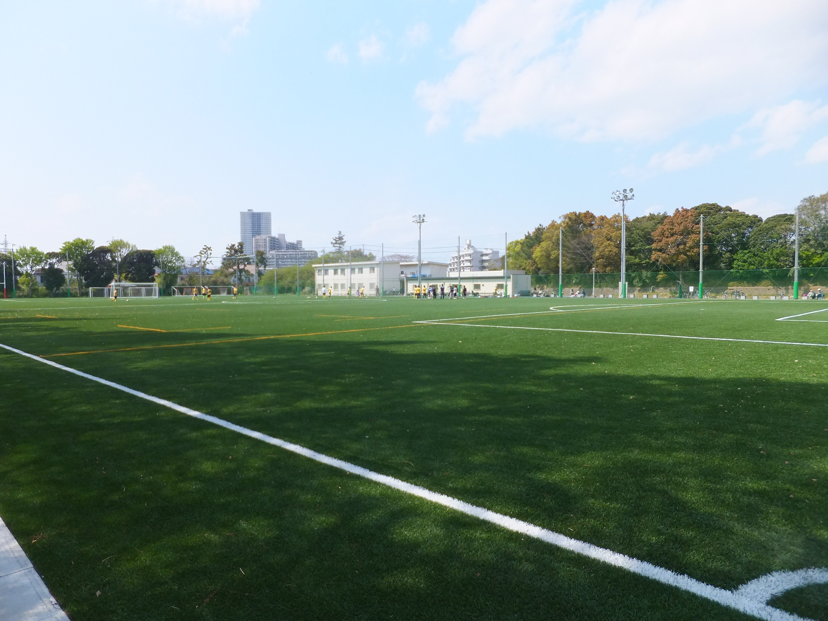 千葉大学西千葉キャンパス、サッカー・ラグビーグラウンド。2014年に人工芝化工事が完成した。